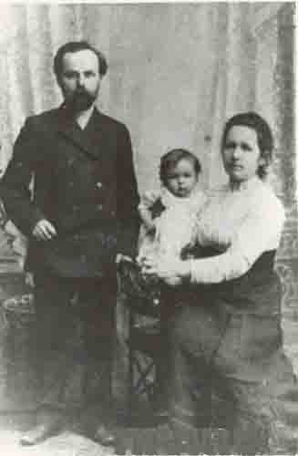 Александр Егорович Кропотов (31 марта 1874 — 1934) — крестьянин, эсер, депутат Государственной думы III созыва от Вятской губернии и Всероссйиского Учредительного собрания с женой Анной Яковлевной Кропотовой, урождённая Бурковой, выпускницей Уржумской прогимназии, учительницей из села Салтакъял и ребёнком